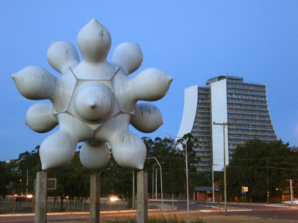 escultura de Saint Clair Cemin em Porto Alegre